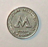 picture